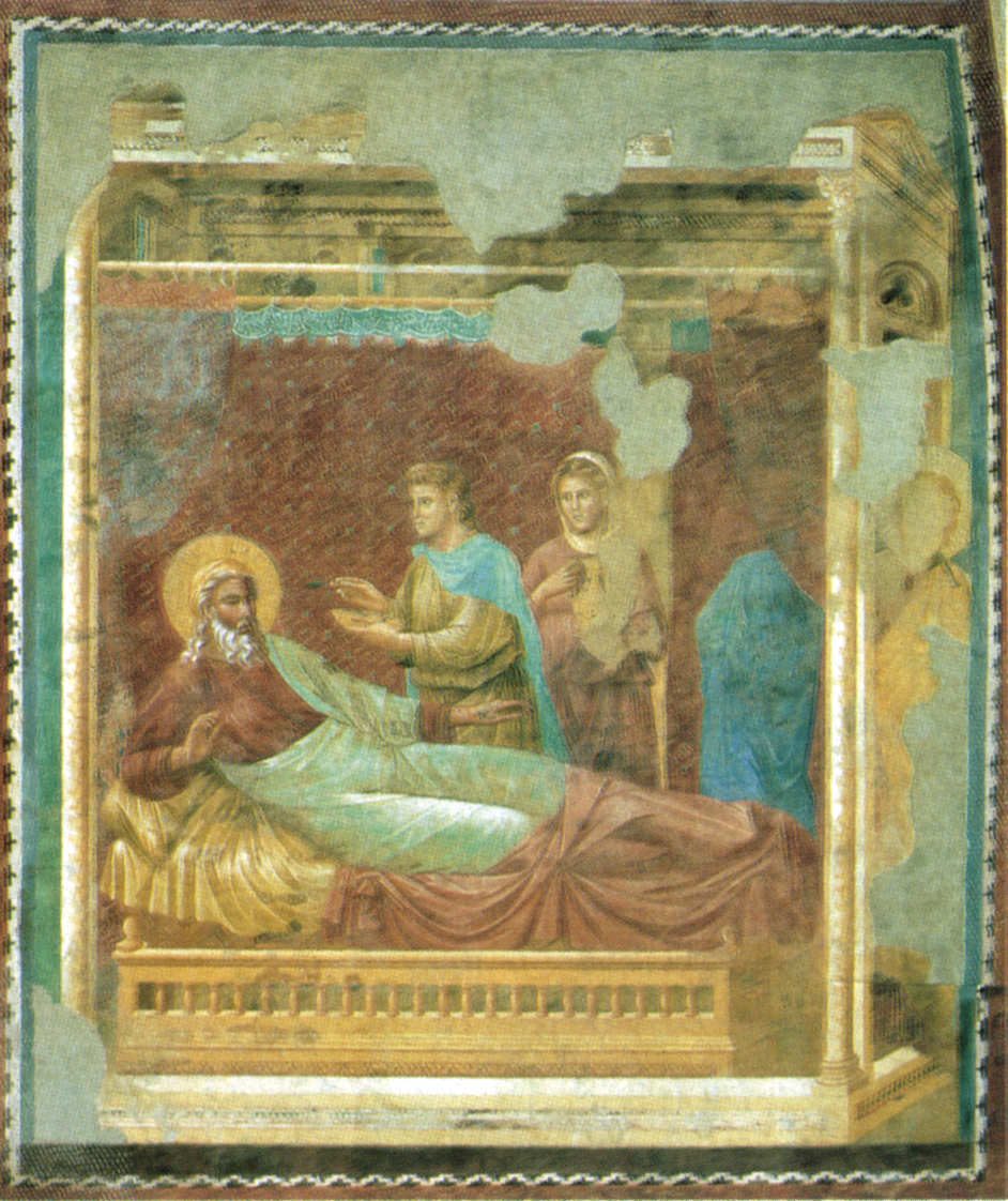 Freskenzyklus zum Leben des Hl. Franziskus von Assisi